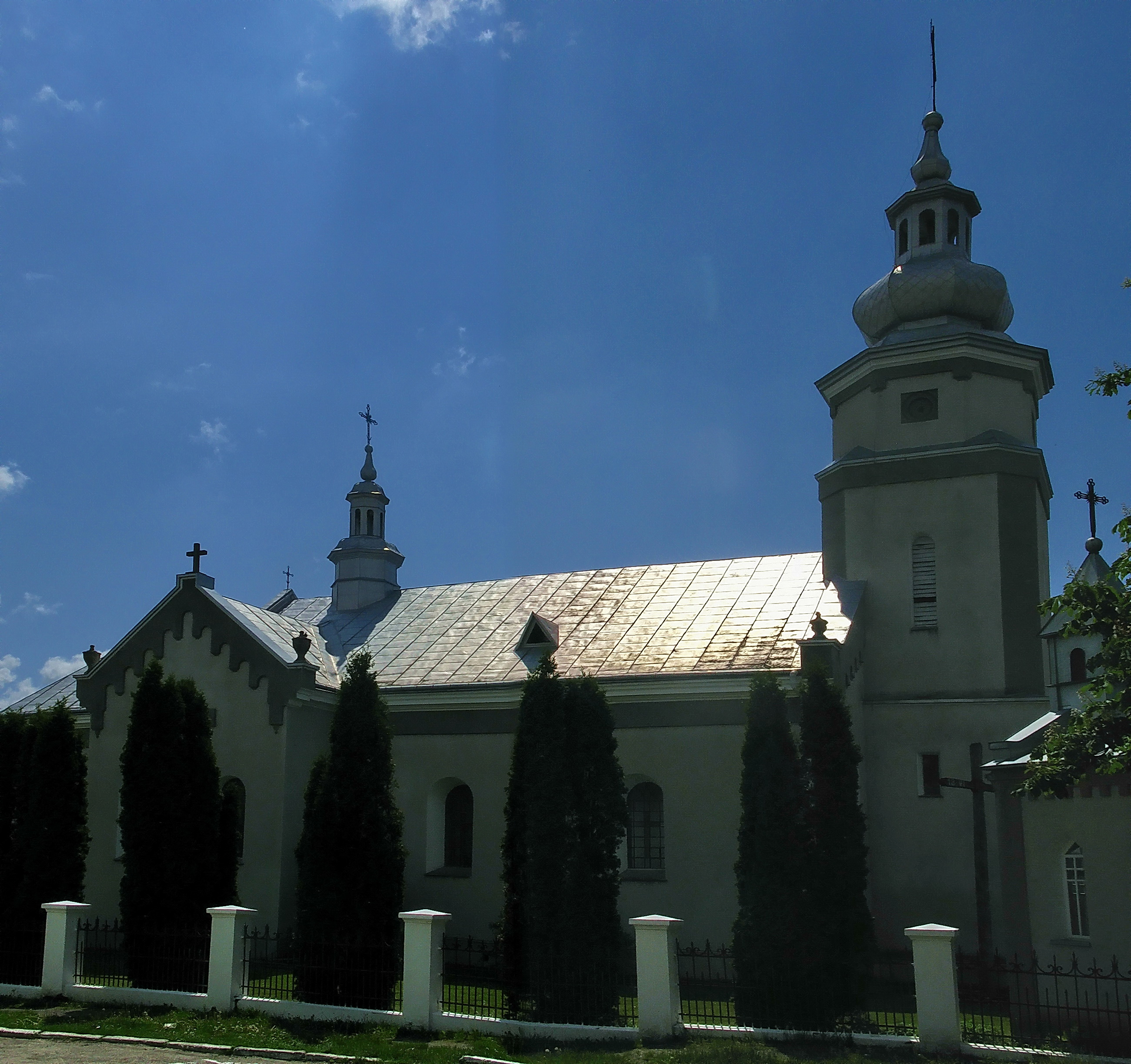 Троїцький костел, Борщів